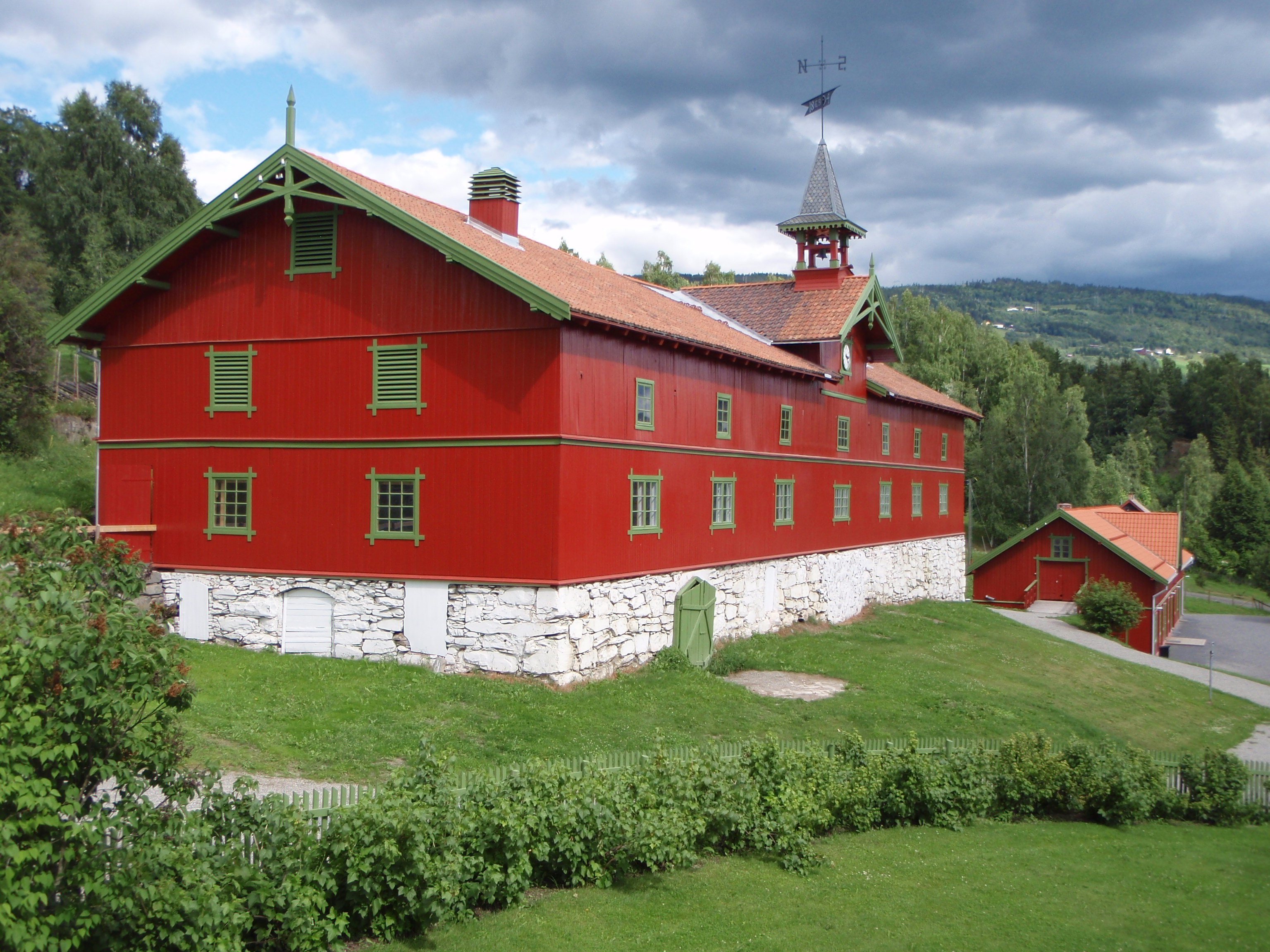 Låven på Aulestad er idag bygget om til utstillingsvirksomhet.